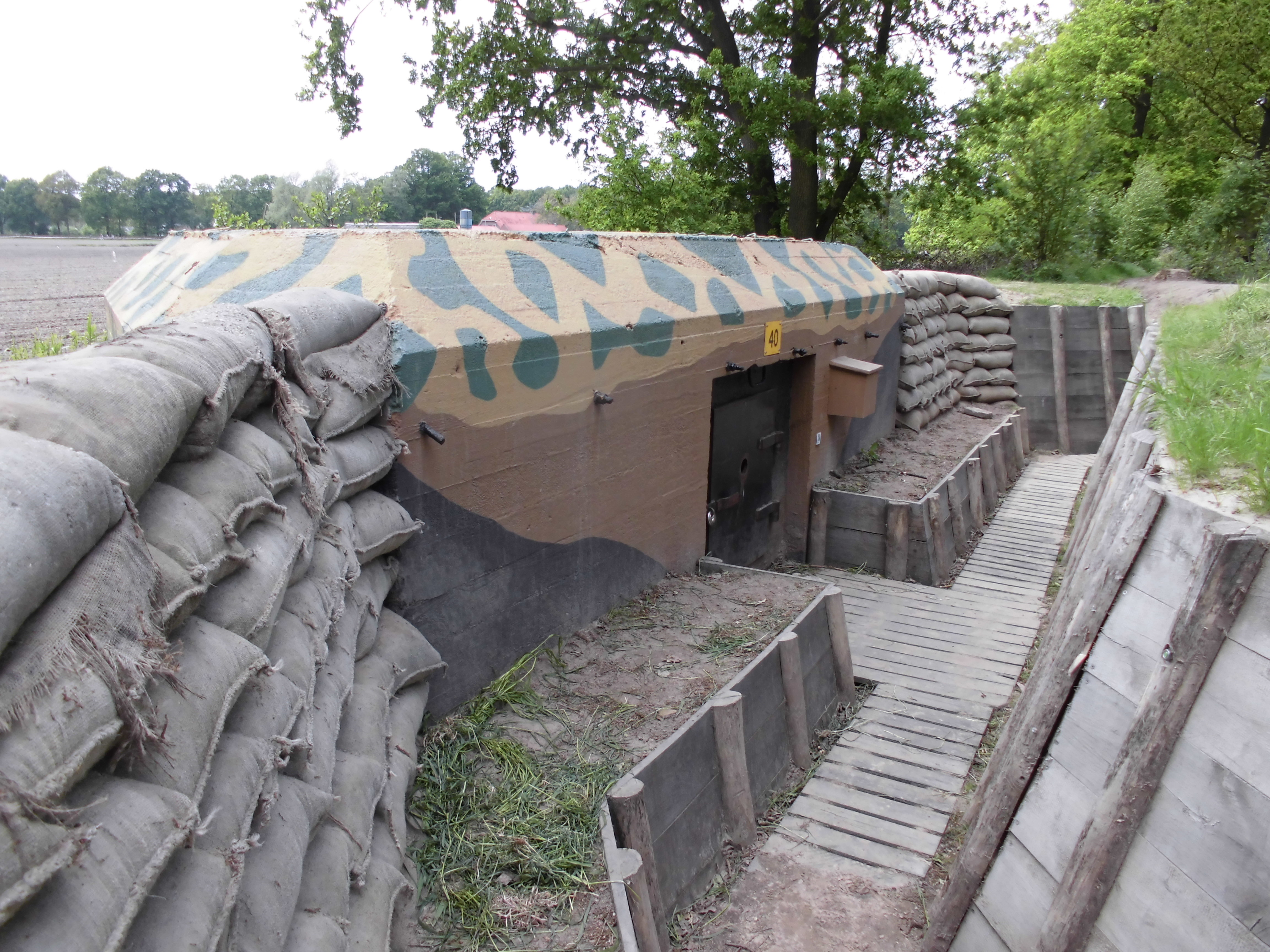 Kazemat GL040 Asschatterkade